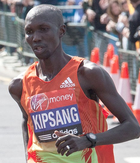 Wilson Kipsang during 2012 London Marathon